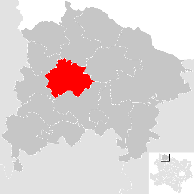 Bezirk Waidhofen an der Thaya